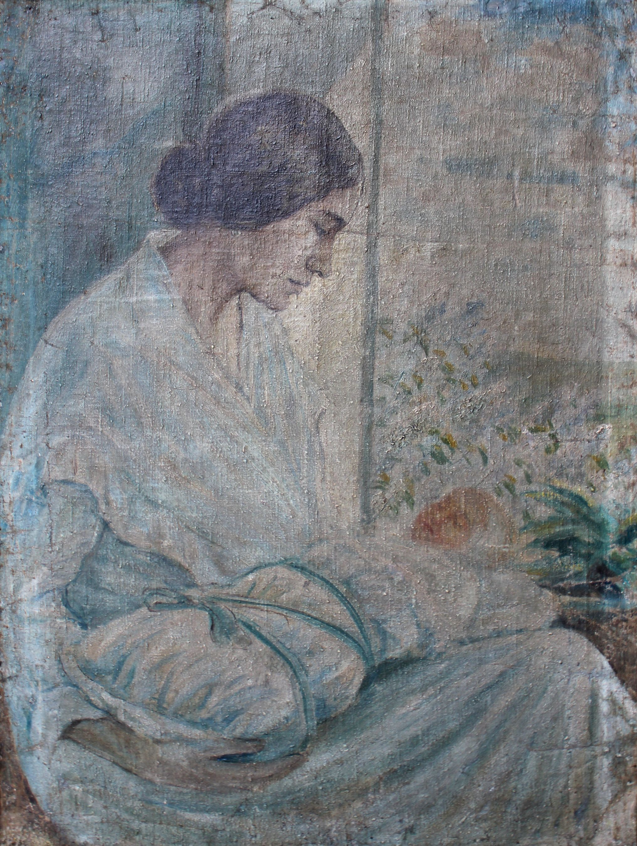 Portret żony Jadwigi Konarzewskiej z synem Ludwikiem - Buzułuk 1918 r.